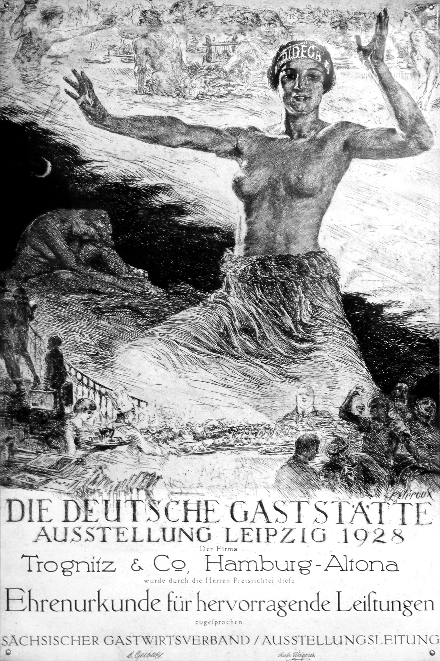 Fotografie eines Emailleschildes in Plau am See, Werbeplakat für die Ausstellung DIDEGA (Die Deutsche Gaststätte) 1928 in Leipzig.